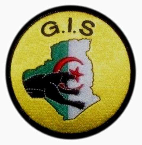 Photo d'un réel écusson du groupement d'intervention spécial.